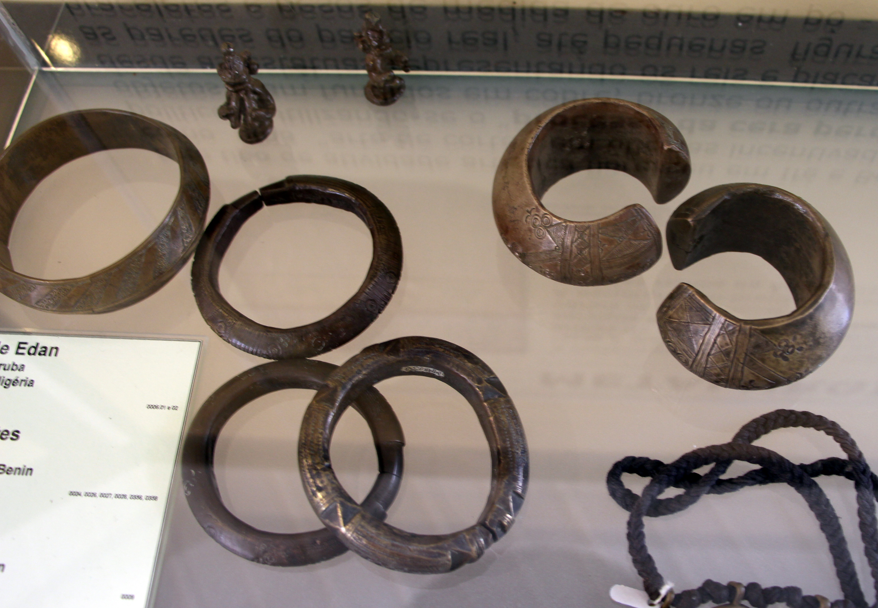 Museu Afro-Brasileiro, Salvador